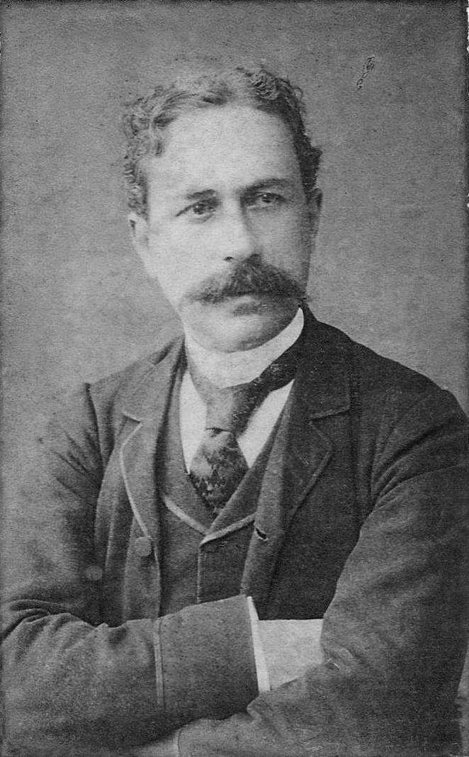 Joaquim Nabuco [bacharel em 1870, embaixador, abolicionista, escritor]. (Col. Francisco Rodrigues; FR-732)